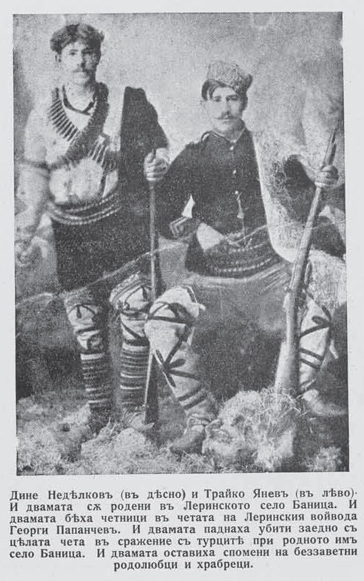 Dine Nedelkov and Trayko Yanev from Banitsa/Vevi